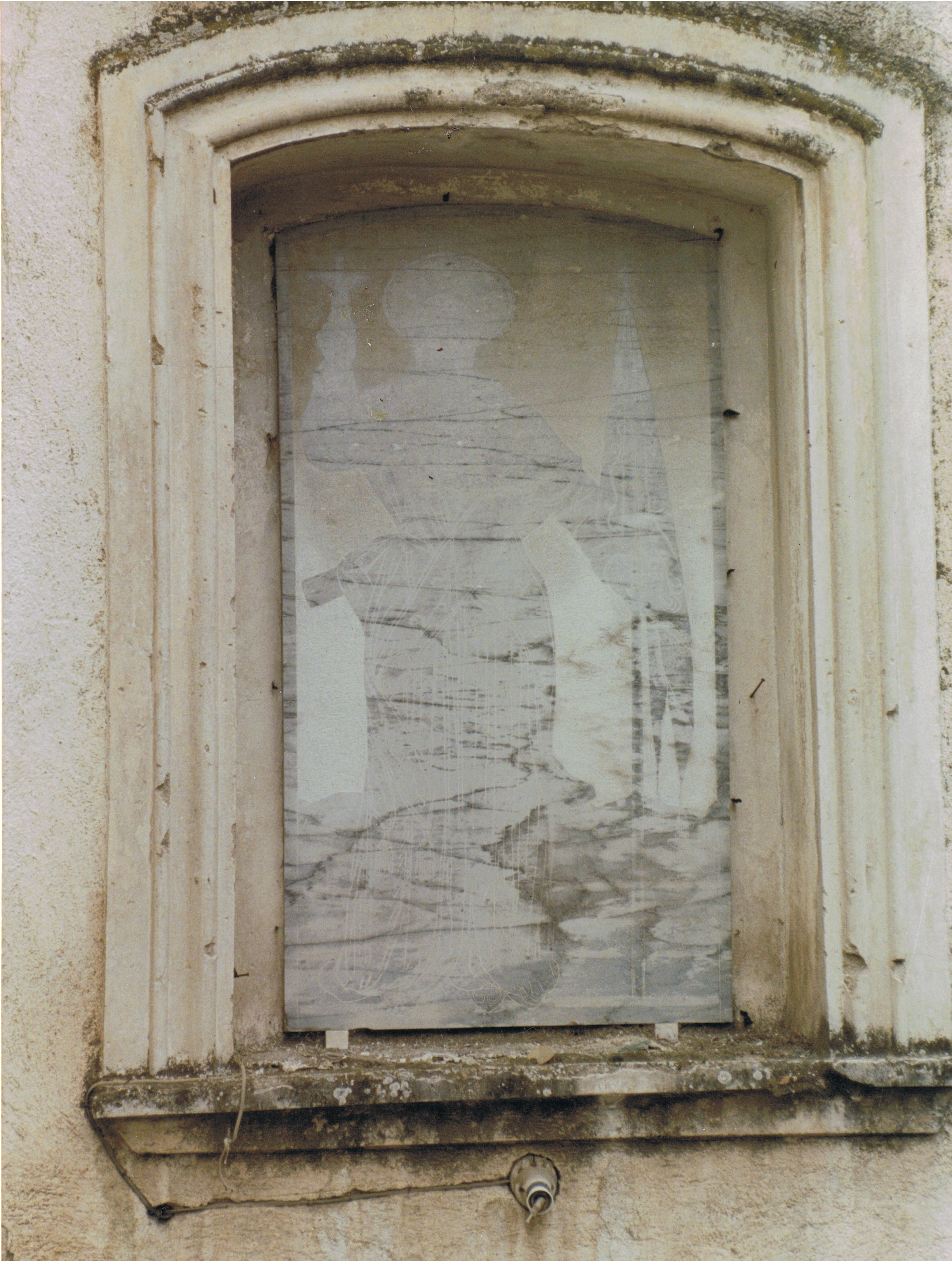 Sant'Agnello Abate su marmo - Santuario di Sant'Agnello Abate